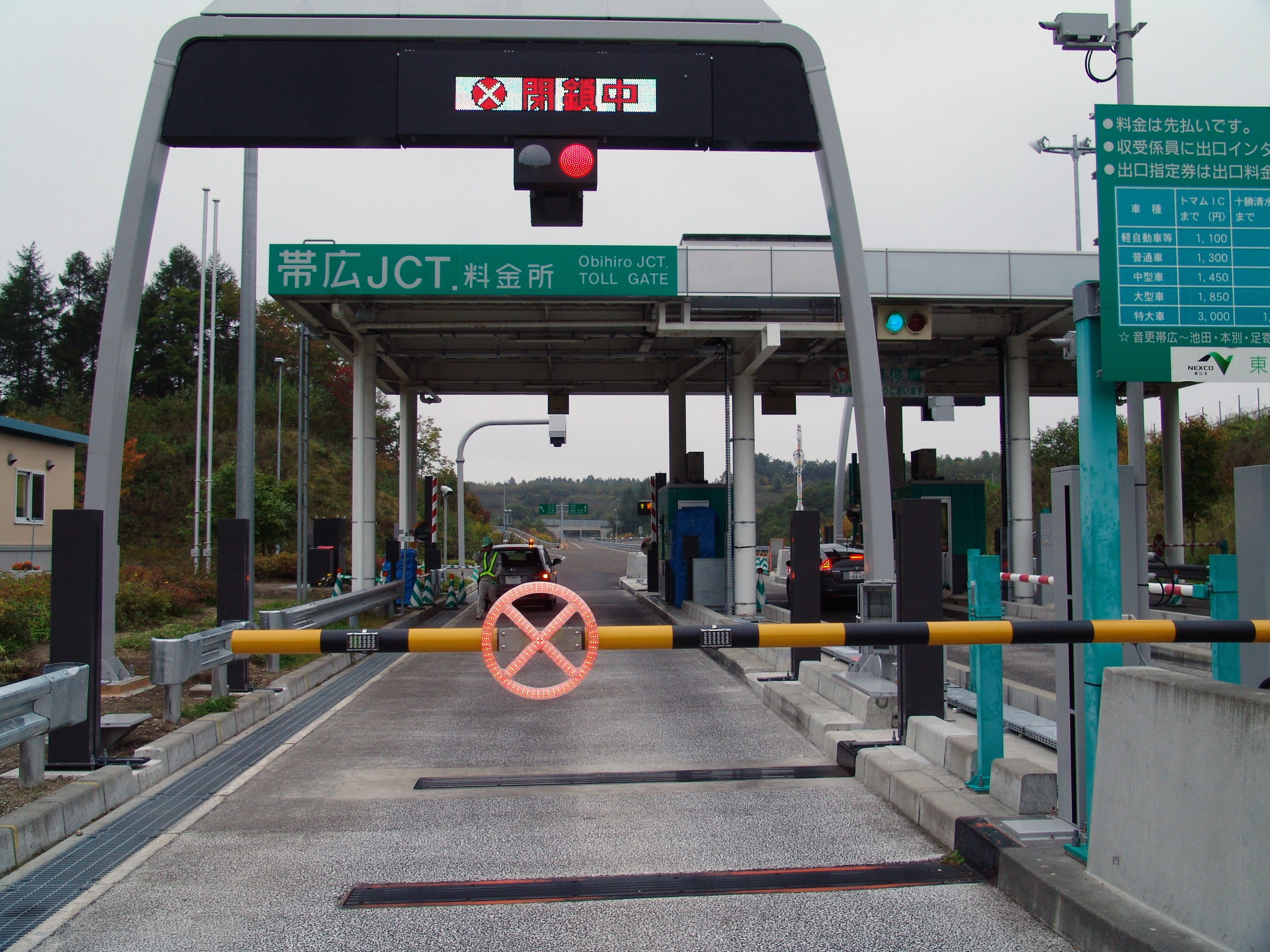 帯広ジャンクション